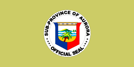 Dit materiaal is afkomstig van of en is door de auteur Jaume Ollé als GFDL beschikbaar gesteld, zie de toestemmingsemail. Hiermee vervallen de strictere voorwaarden in de disclaimers op de genoemde sites.Vrijgegeven bijdrage op Flags of the World van Jaume Olle. Zie deze verklaring op de Spaanstalige Wikipedia. GNU FDL